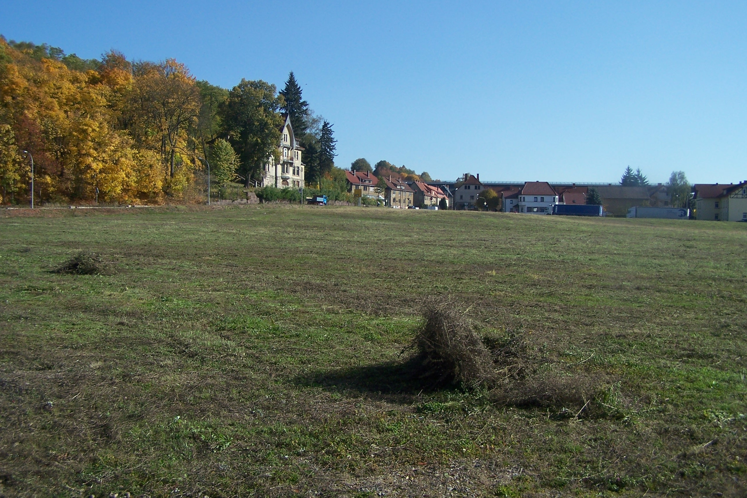 Das Ergebnis der Standortsanierung der ehem. Kammgarnspinnerei Wernshausen, Landkreis Schmalkalden-Meiningen.